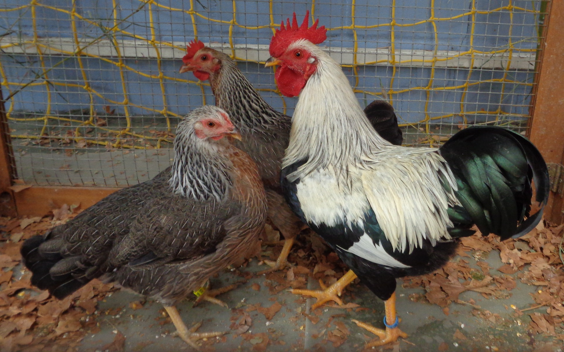 Trio de poules Welsumer argenté saumoné naines